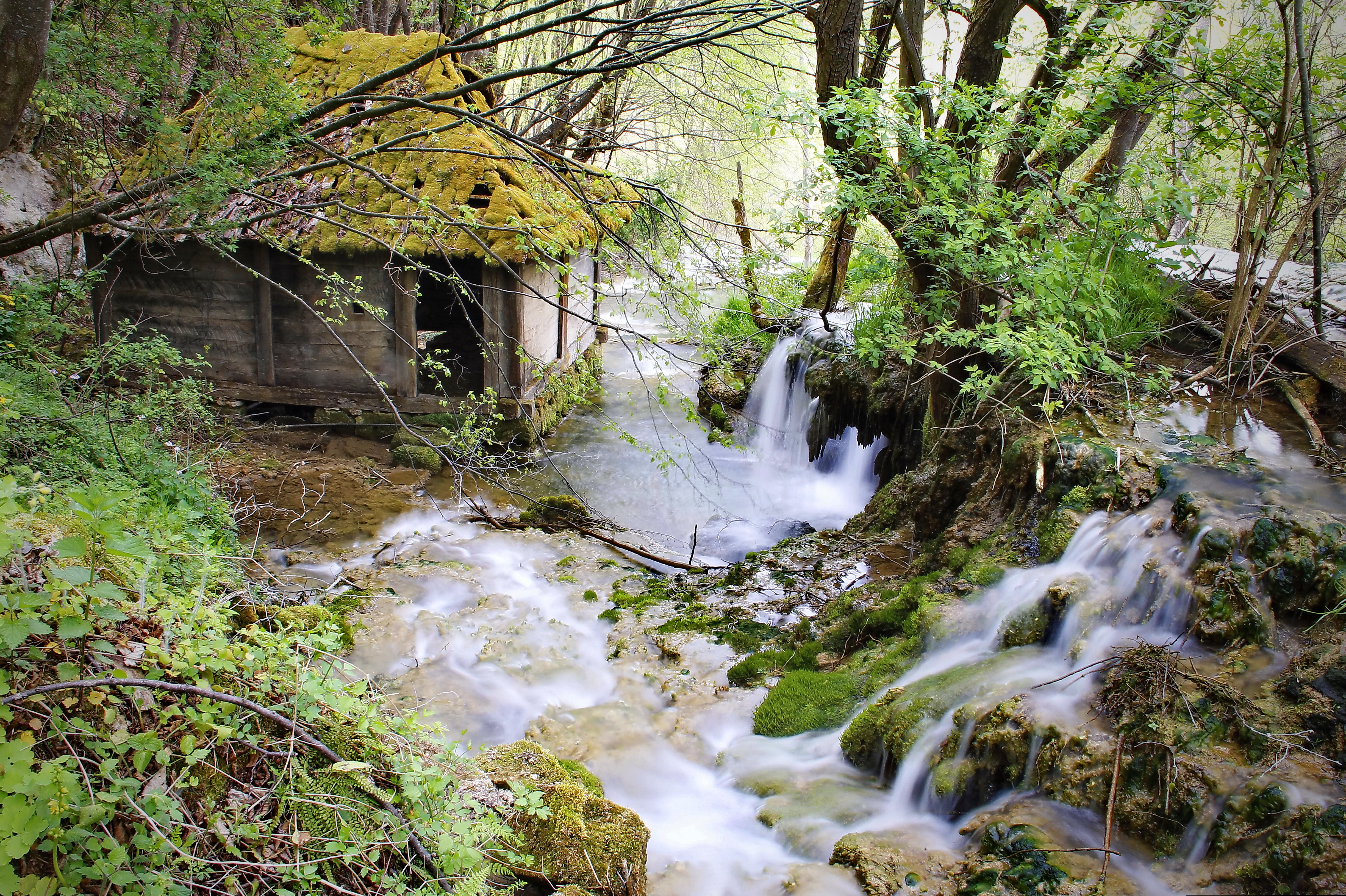 Taorska vrela u selu Donji Taor, valjevska opština